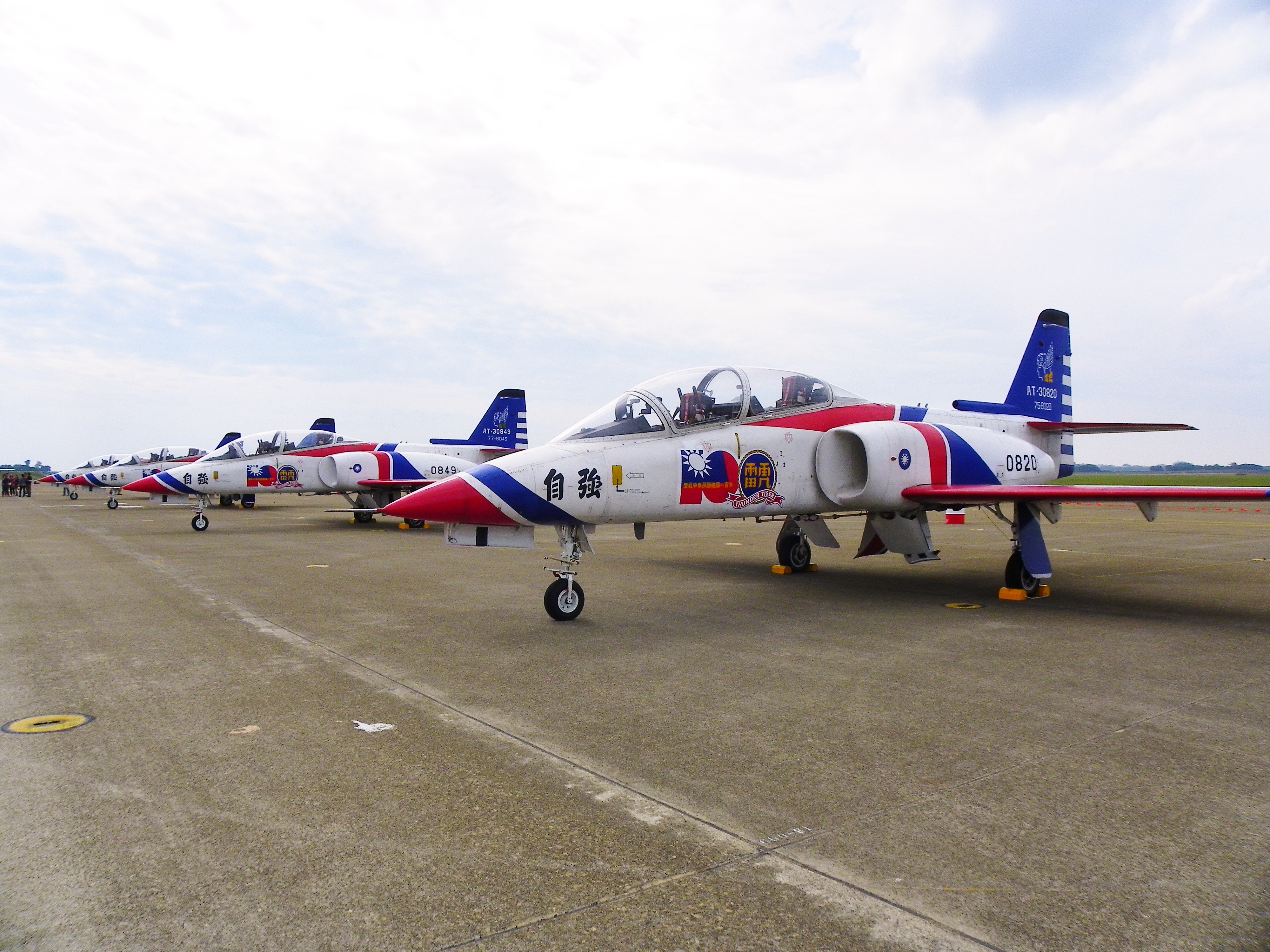 中文（台灣）: 2011年空軍清泉崗基地營區開放活動，停機坪西側雷虎特技飛行小組7架AT-3的其中4架。